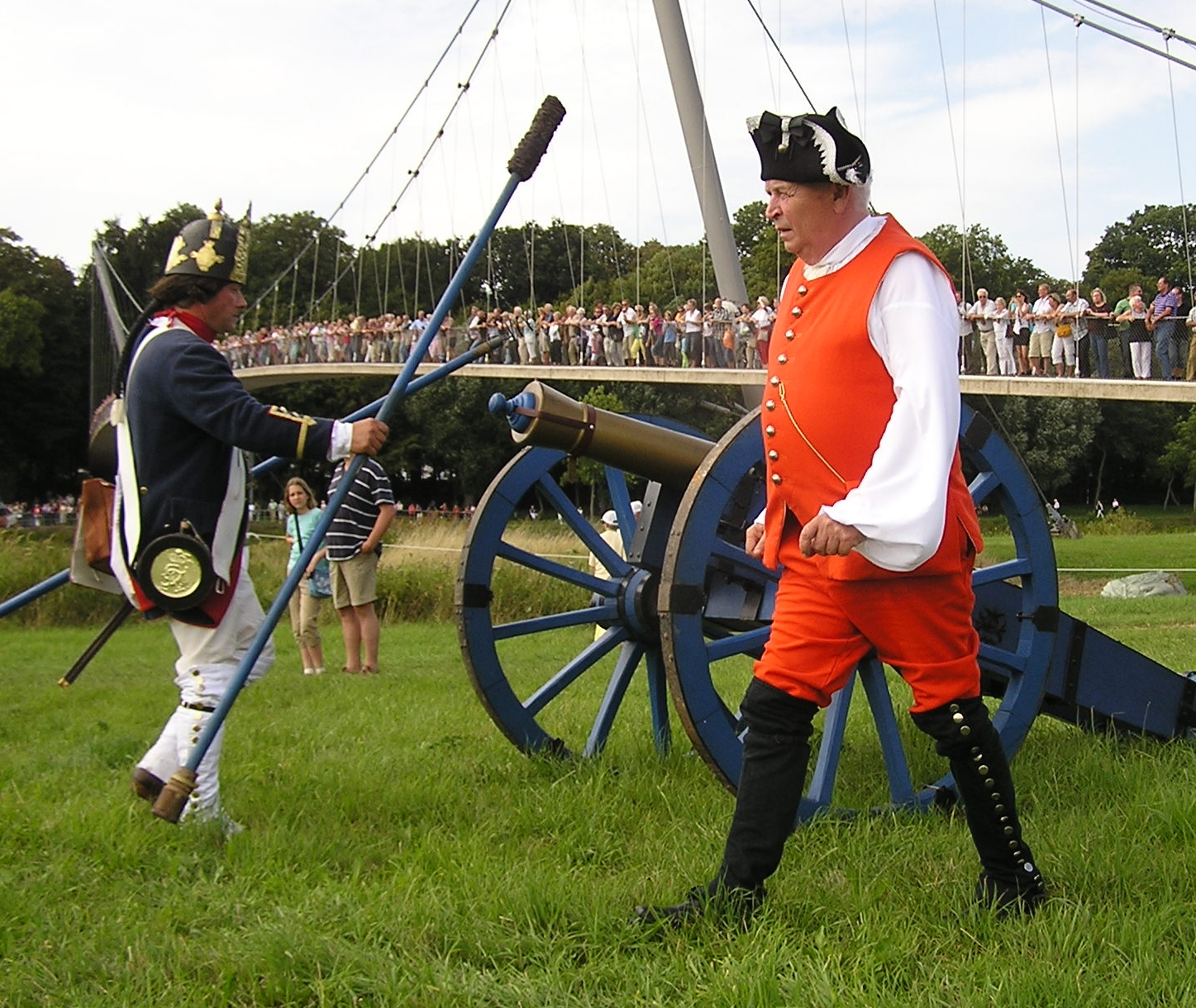 Schlacht bei Minden, Kanone vor der Fußgängerbrücke über die Weser